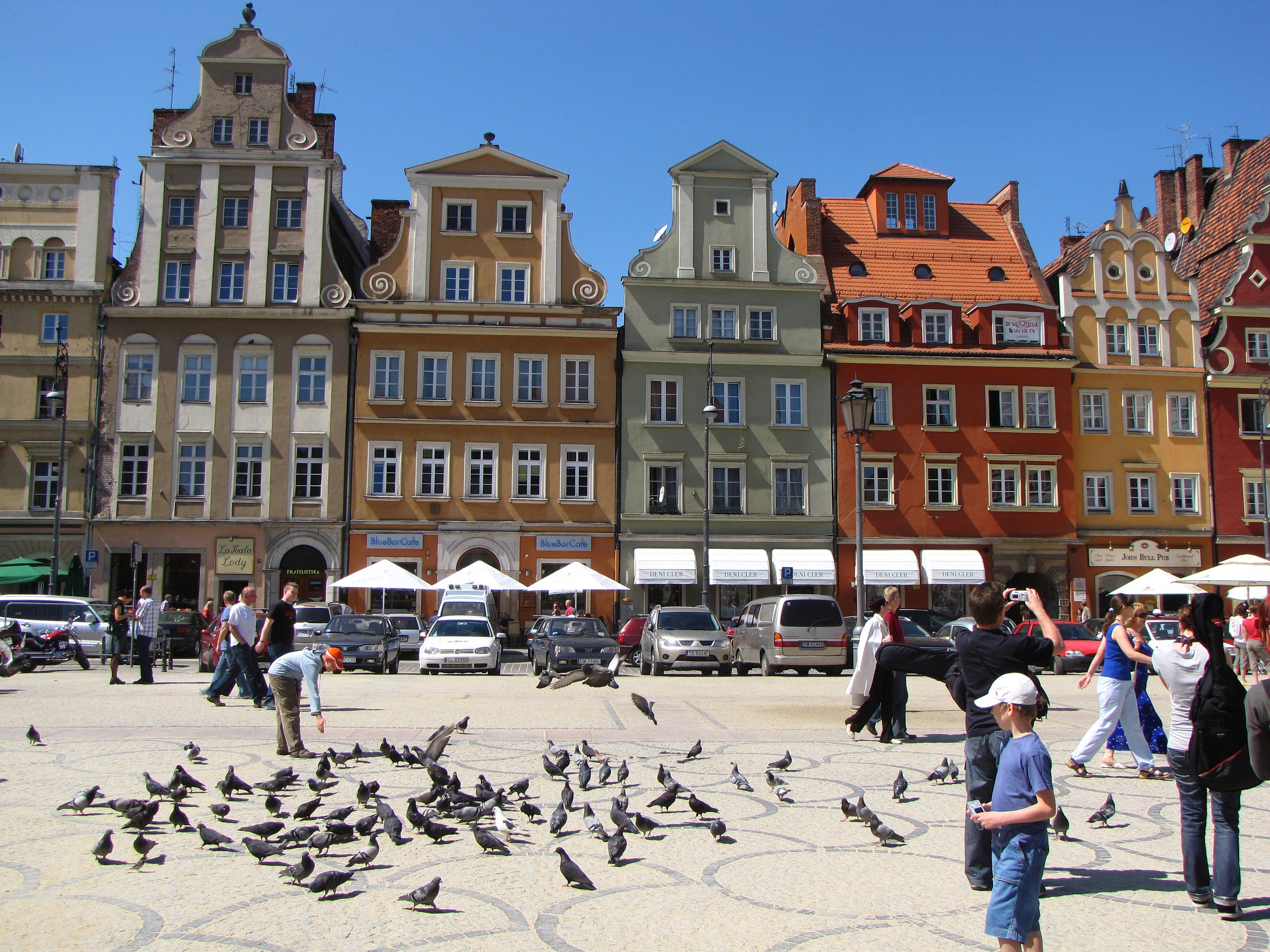 Wrocław